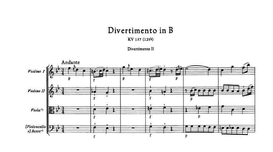 Mozart K.137の第1楽章冒頭部